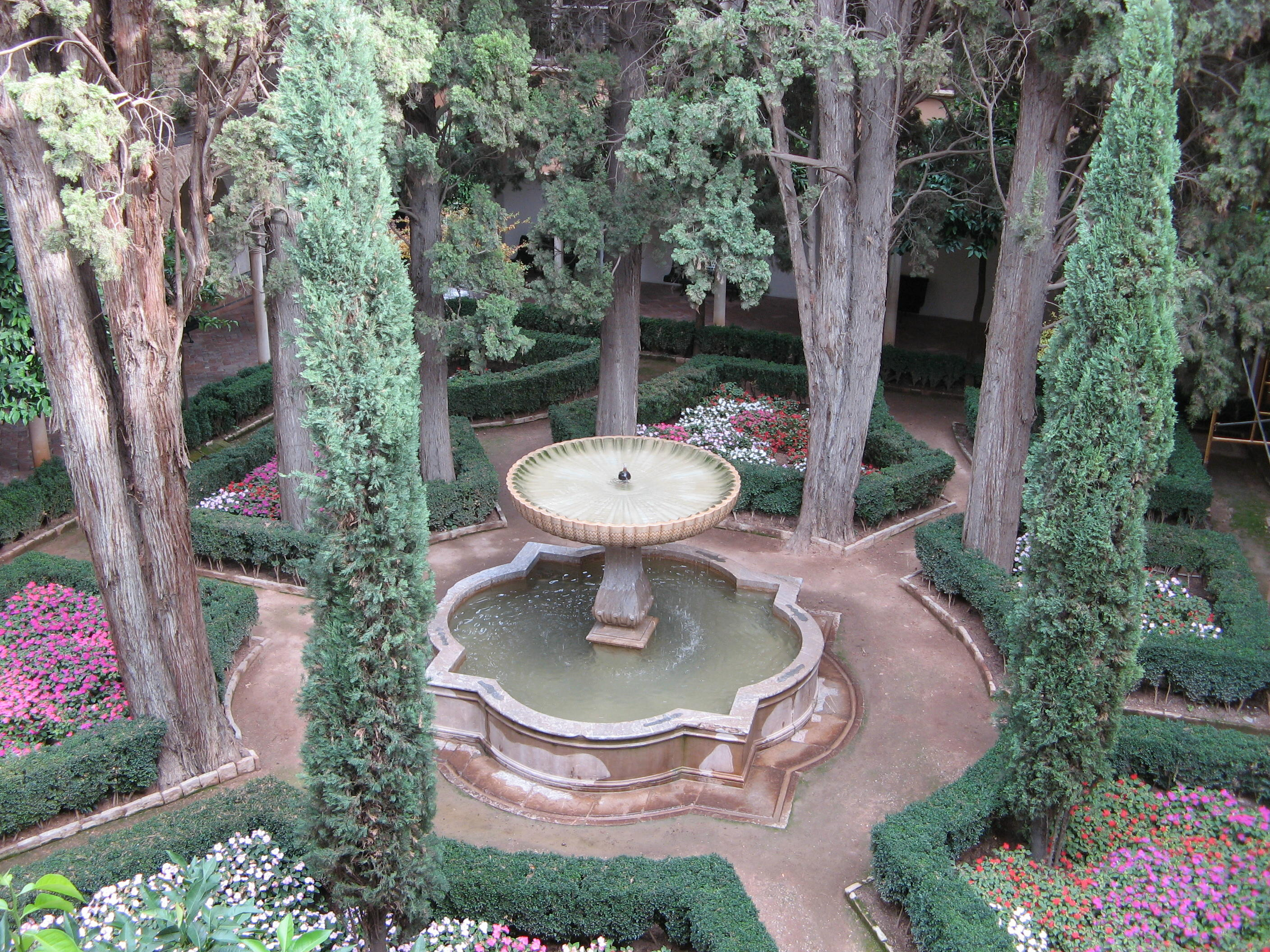 Garten/Garden/Jardin in Alhambra - Granada, Spain